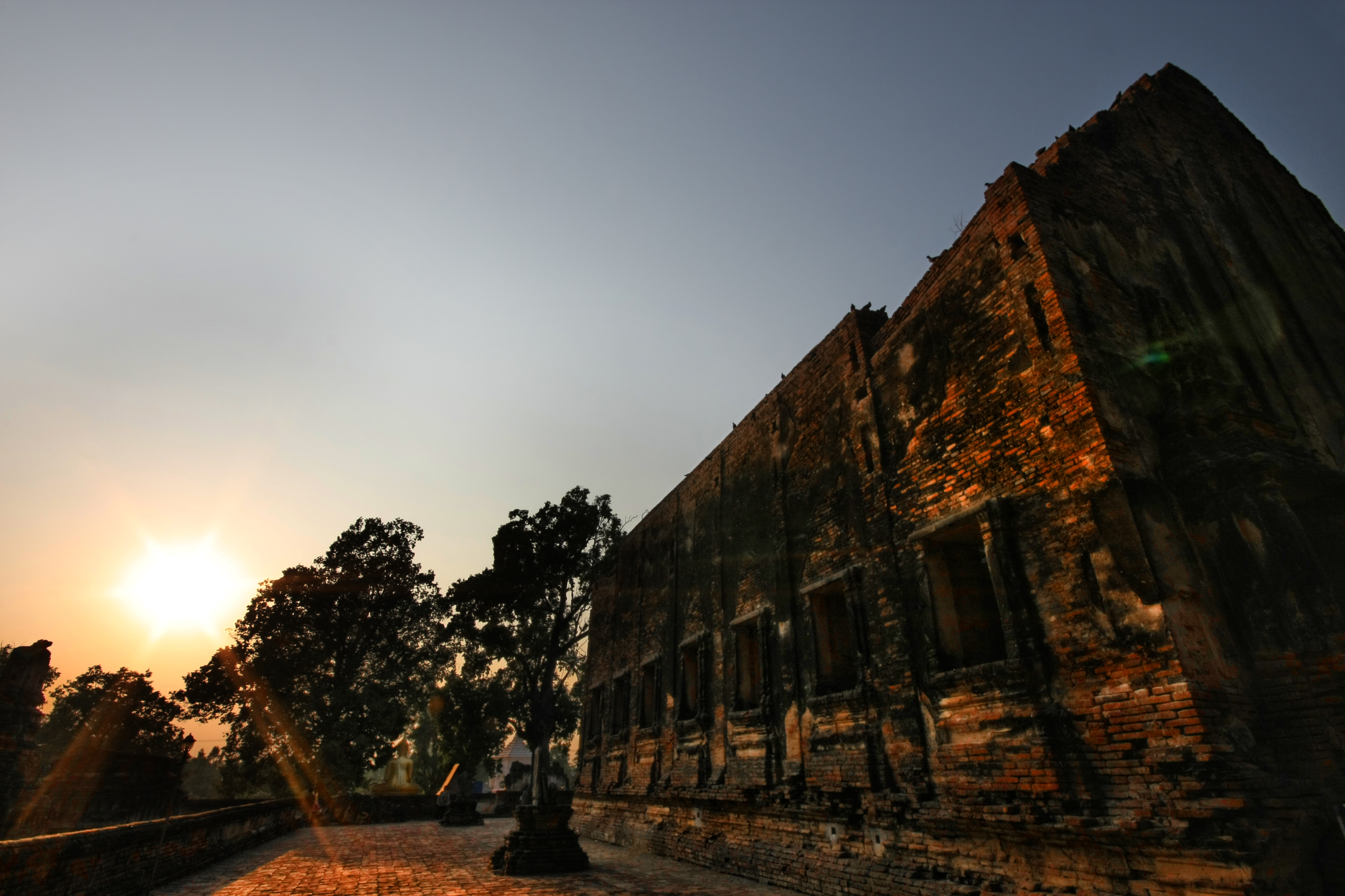 วัดโพธิประทับช้าง